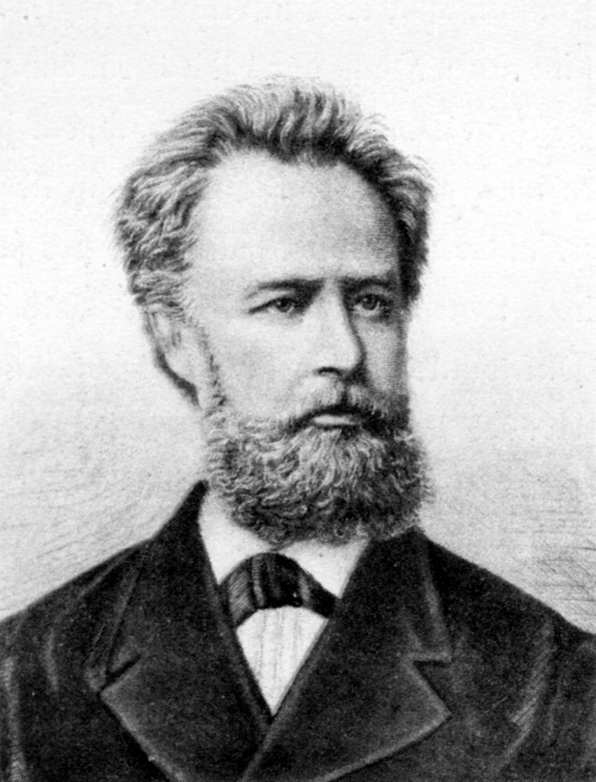 Friedrich Kapp (1824–1884); Lithographie um 1880